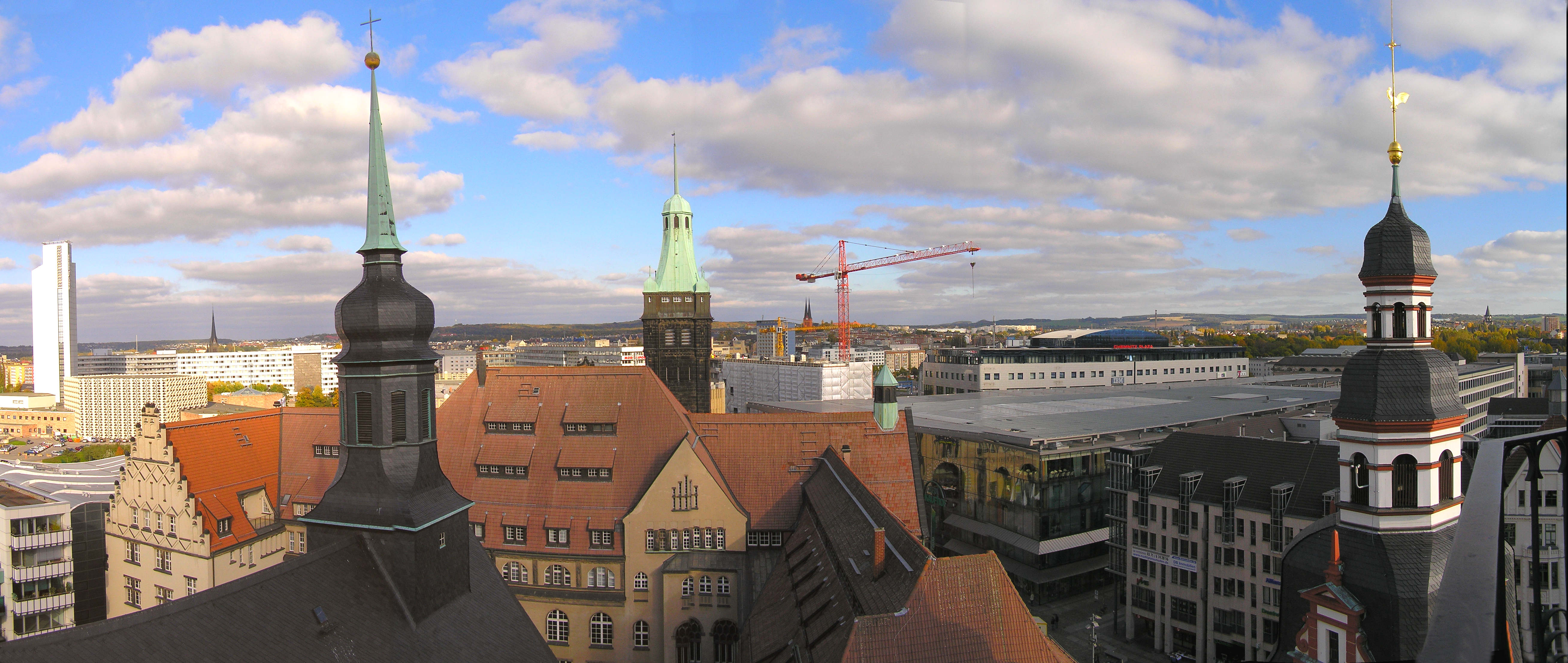 Blick über die Türme des Rathauses der Stadt Chemnitz, links Stadtkirche St. Jakobi - Denkmalschutzgebiet Historische Innenstadt Chemnitz. Quelle: selbst fotografiert am 16.10.2005 Fotograf: André Pistotnik